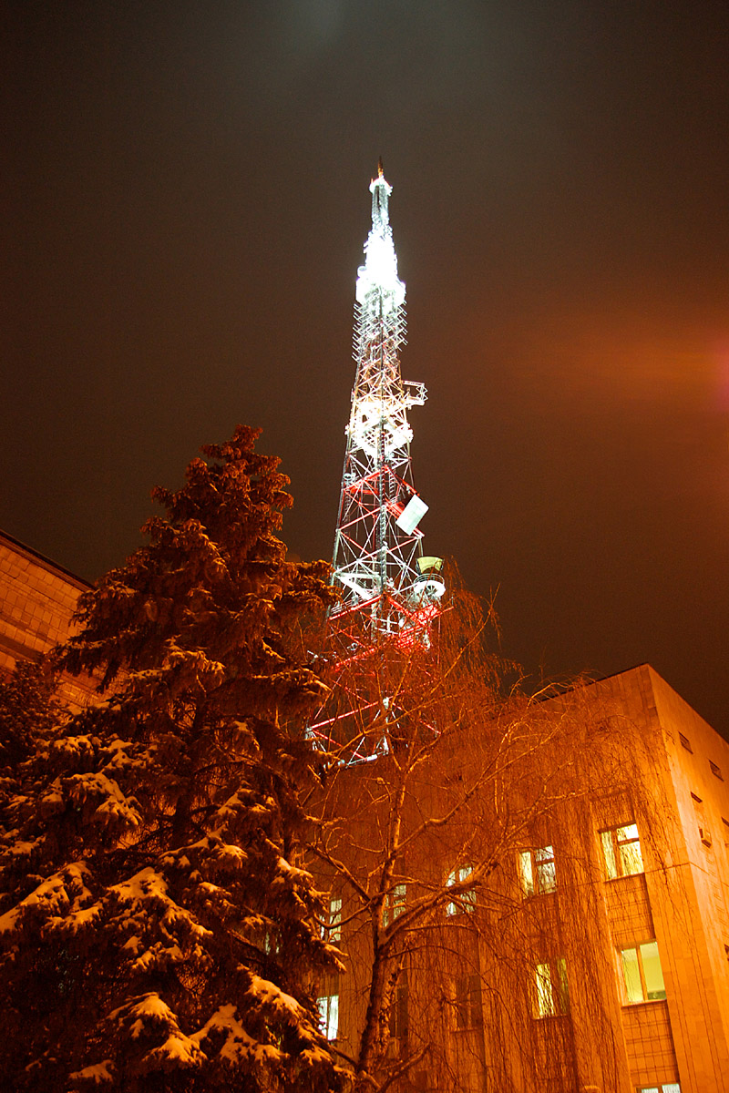 Телевышка Ростовского ОРТПЦ и ГТРК "Дон-ТР"